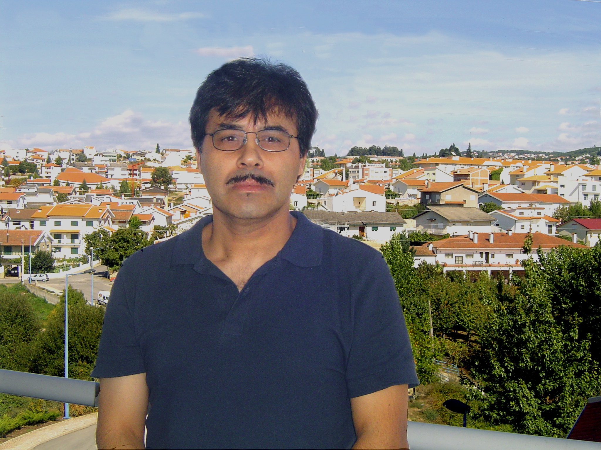 Alexandre Parafita, portuguese writer